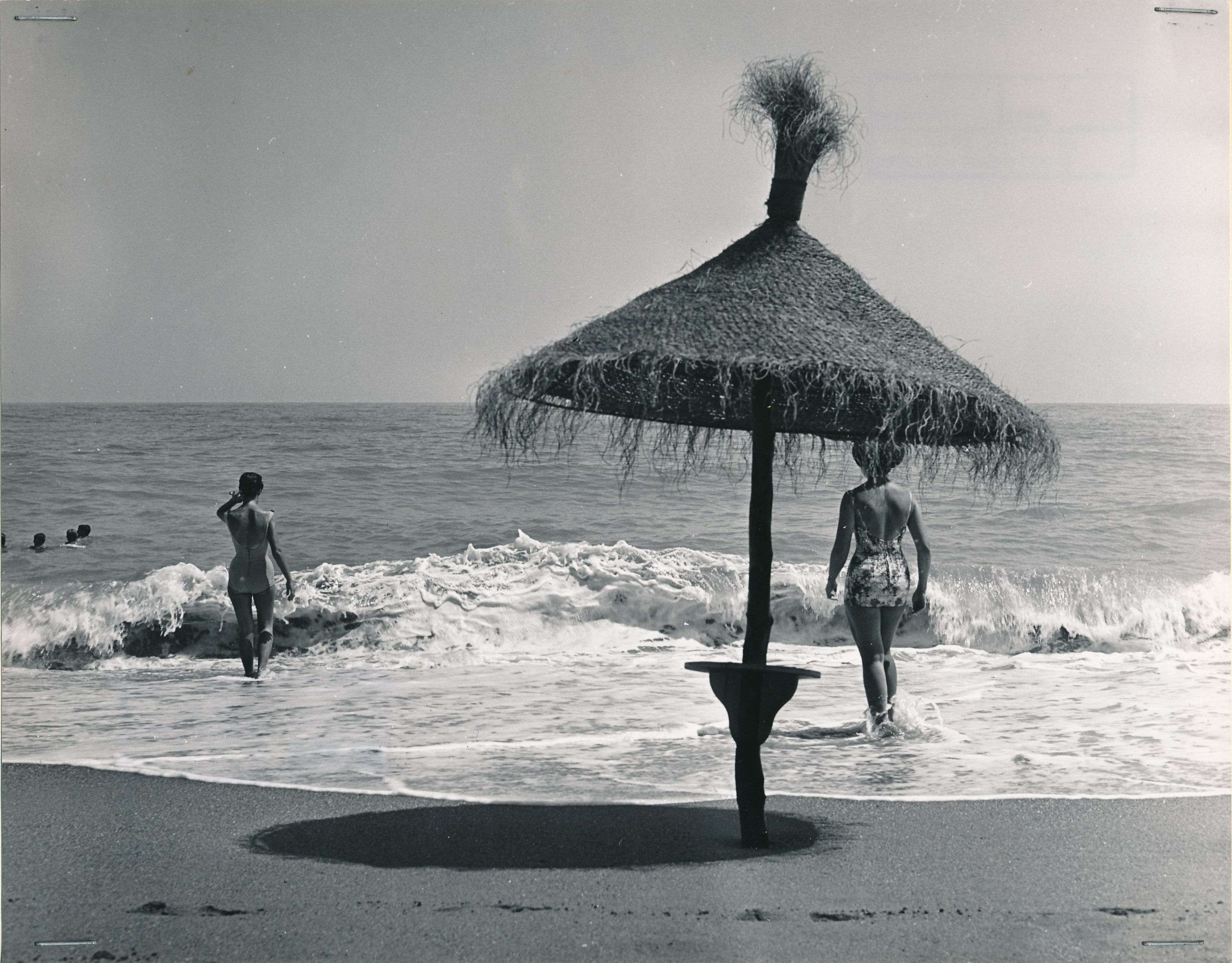 Torremolinos (Málaga) Procedencia: Archivo Fotográfico de la Dirección General de Turismo (1951-1992) Fotógrafo: Servicio Oficial de Fotografía Registro nº: 00016 Signatura: Caja 1 Fondos: Biblioteca de la Facultad de Empresa y Gestión Pública (Universidad de Zaragoza) Legado: Luis Fernández Fuster / E.S. Turismo Huesca